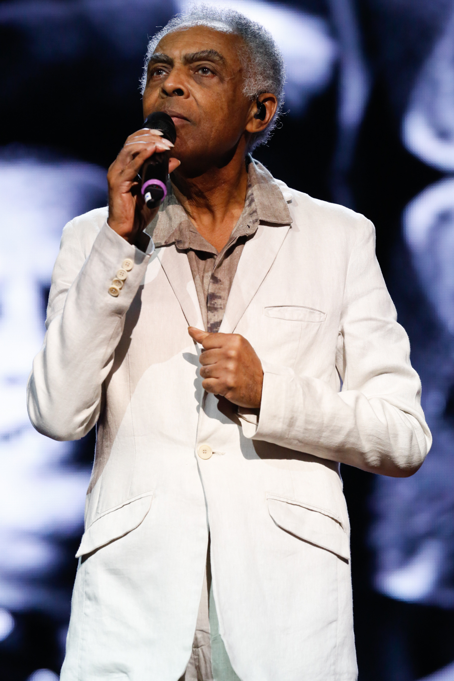 Gilberto Gil durante o 25o Premio da Musica Brasileira no Theatro Municipal. Foto: Roberto Filho (14/05/14)